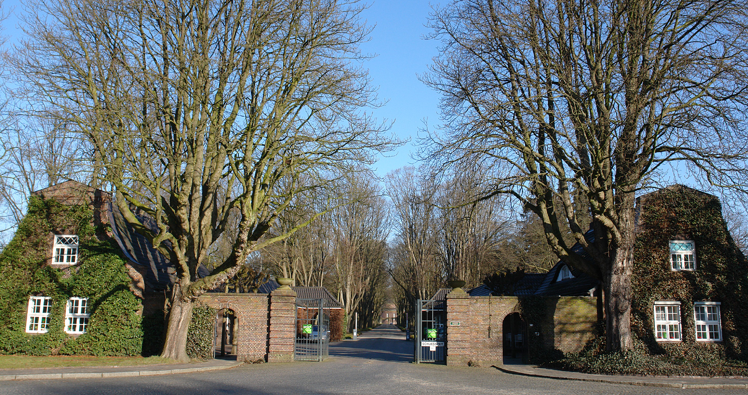 Haupteingang (Osterholzer Heerstraße) zum Osterholzer Friedhof in Bremen Das abgebildete Objekt ist ein geschütztes Kulturdenkmal in der Freien Hansestadt Bremen, mit der Nr. 0969,T beim Landesamt für Denkmalpflege registriert.